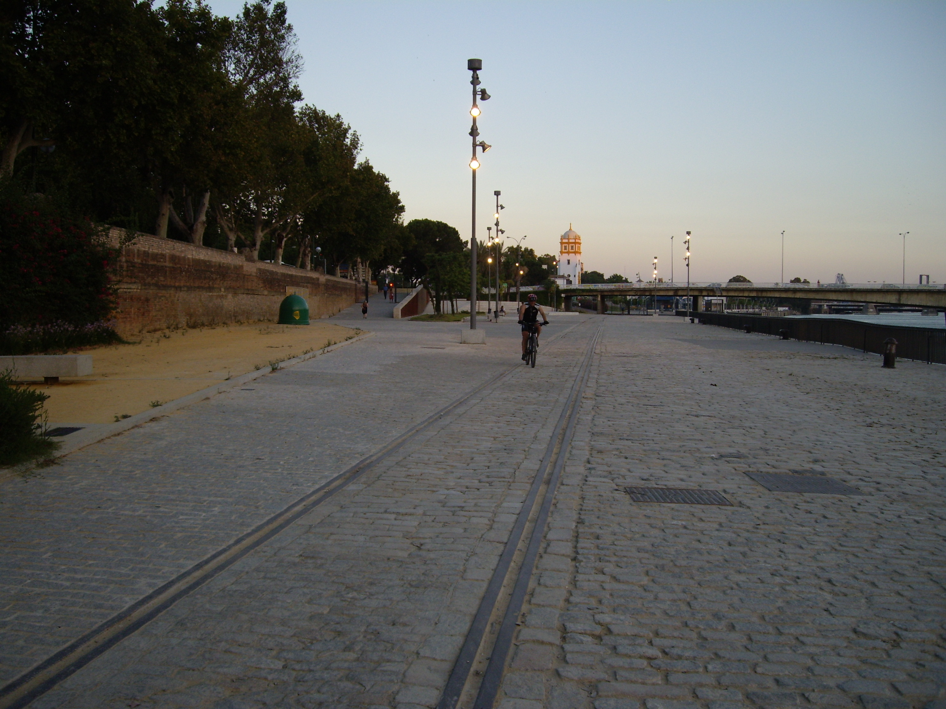 Vías originales en el suelo adoquinado del muelle de Nueva York de Sevilla. La vía era usada para colocar los carros que transportaban el material que se descargaba de los buques.